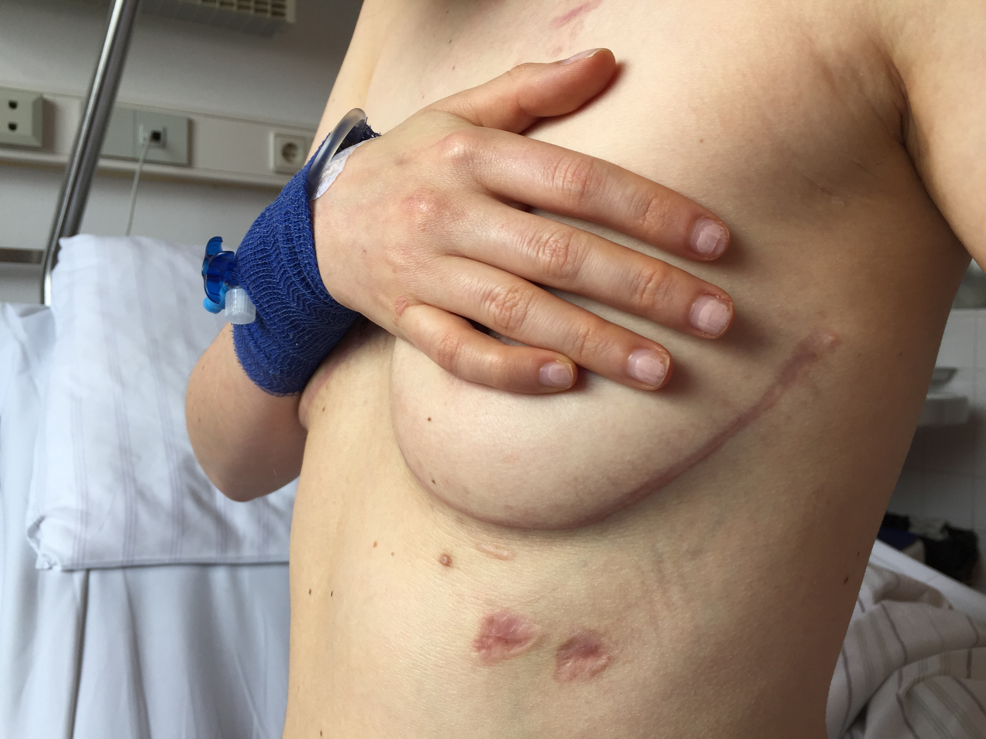 Cirugia de doble transplante de pulmón, enero 11 2020 Salome Castro